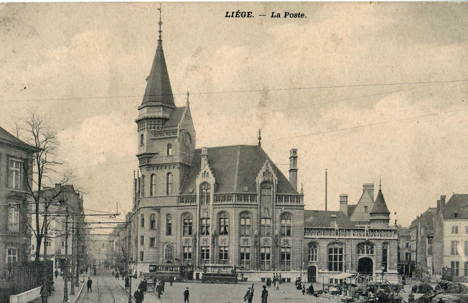 Carte postale ancienne, sans mention d'éditeur : LIÈGE - La Poste